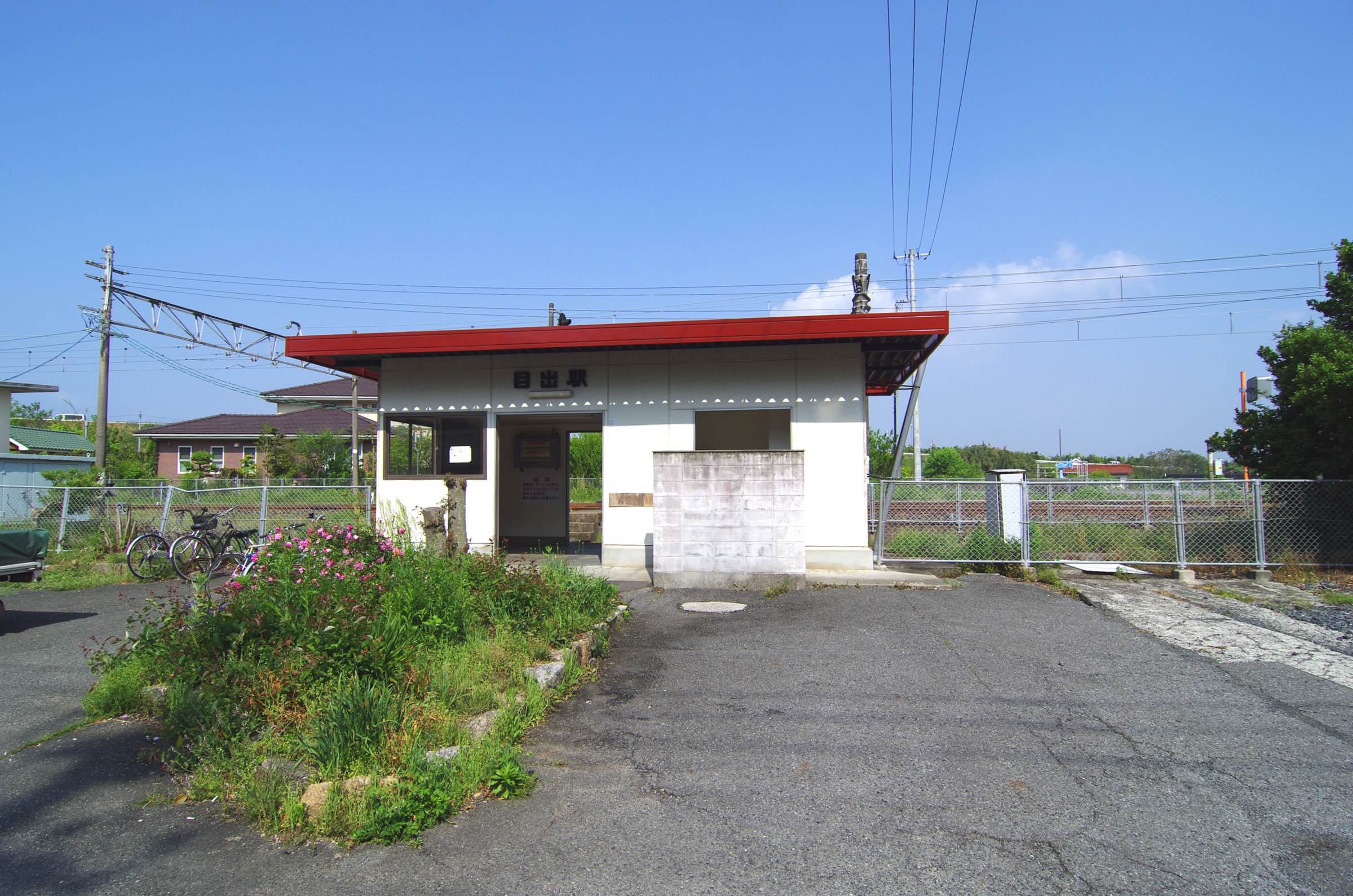 西日本旅客鉄道株式会社小野田線目出駅